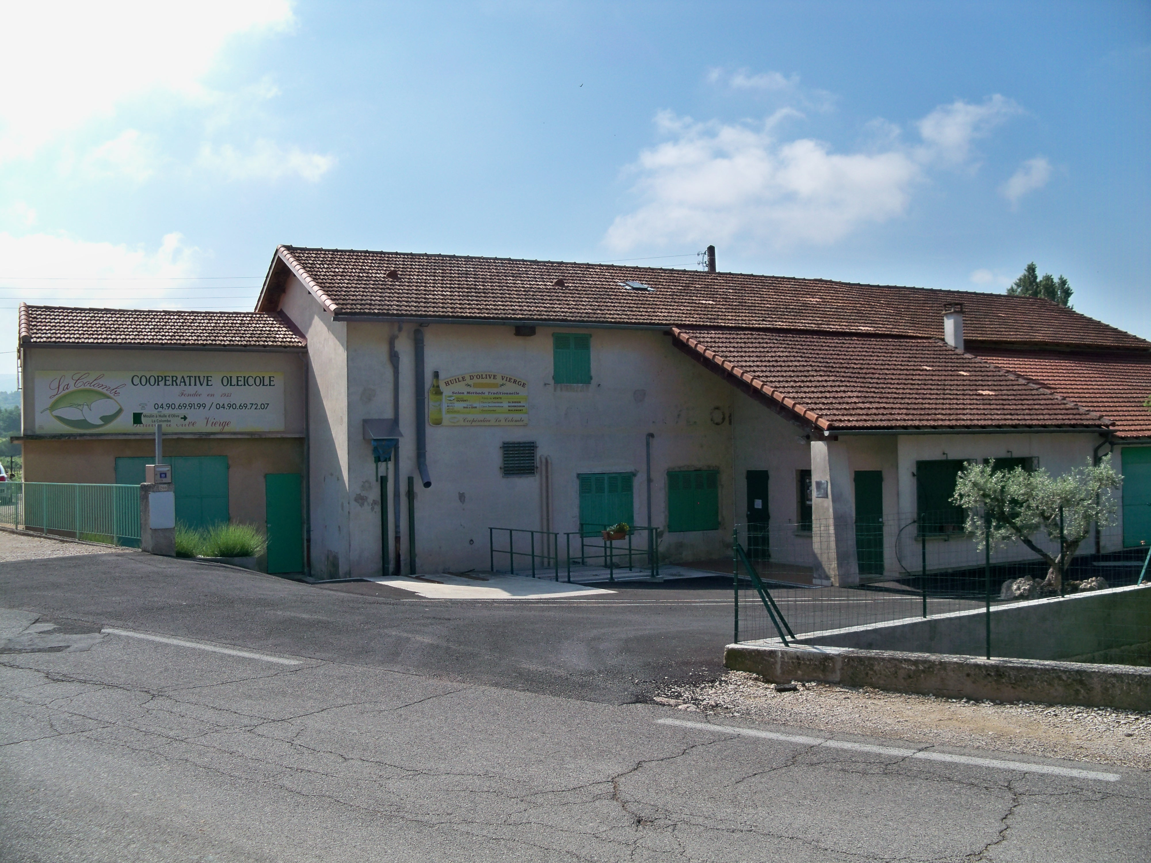 cave coopérative oléicole de Malemort du Comtat (84)